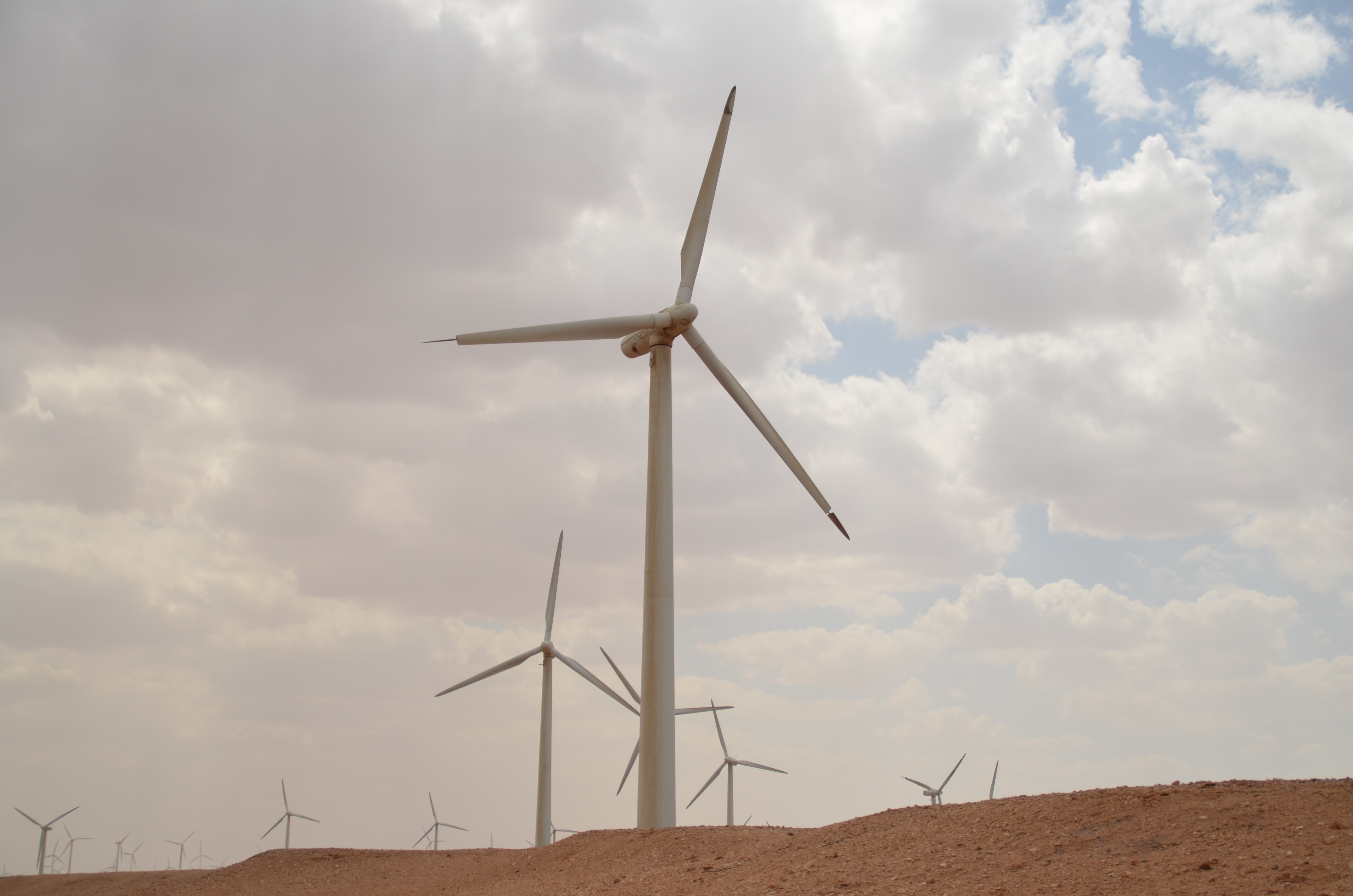 محطة الزعفرانة لتوليد الكهرباء من طاقة الرياح